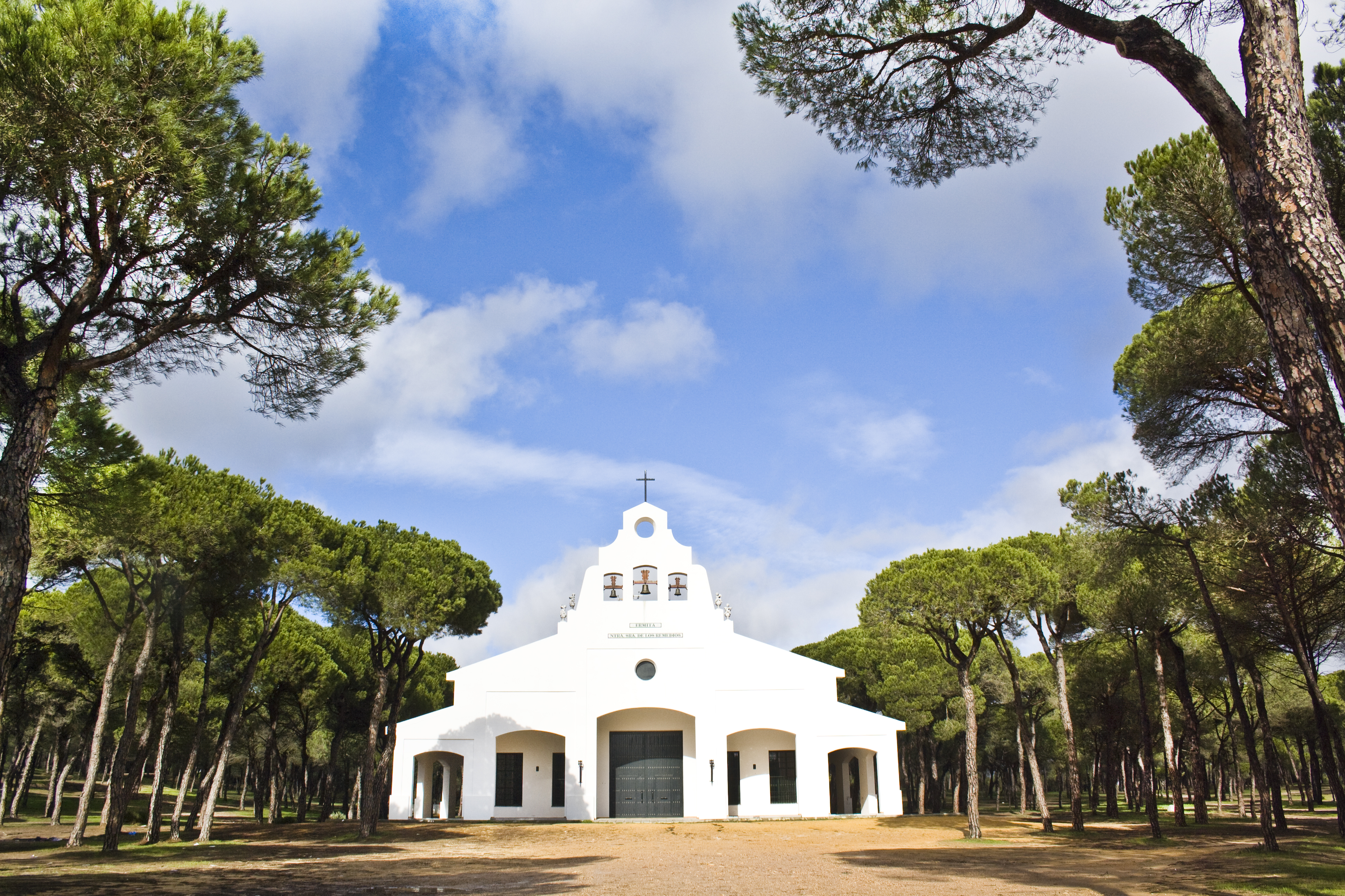 Ermita Ntra. Sra. Virgen de los Remedios Aljaraque (Huelva)